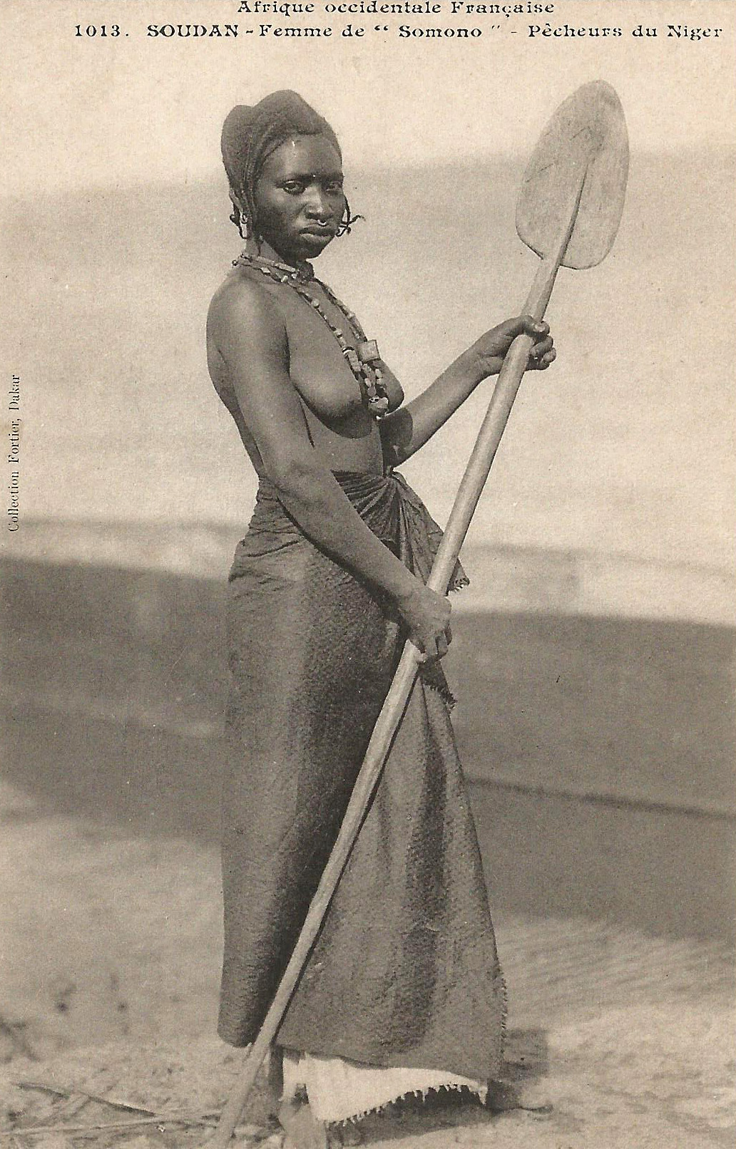 François-Edmond Fortier, Femme de "Somono". Pêcheurs du Niger. Afrique Occidentale Française - Soudan.